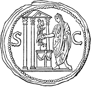 Libation pratiquée isolément.